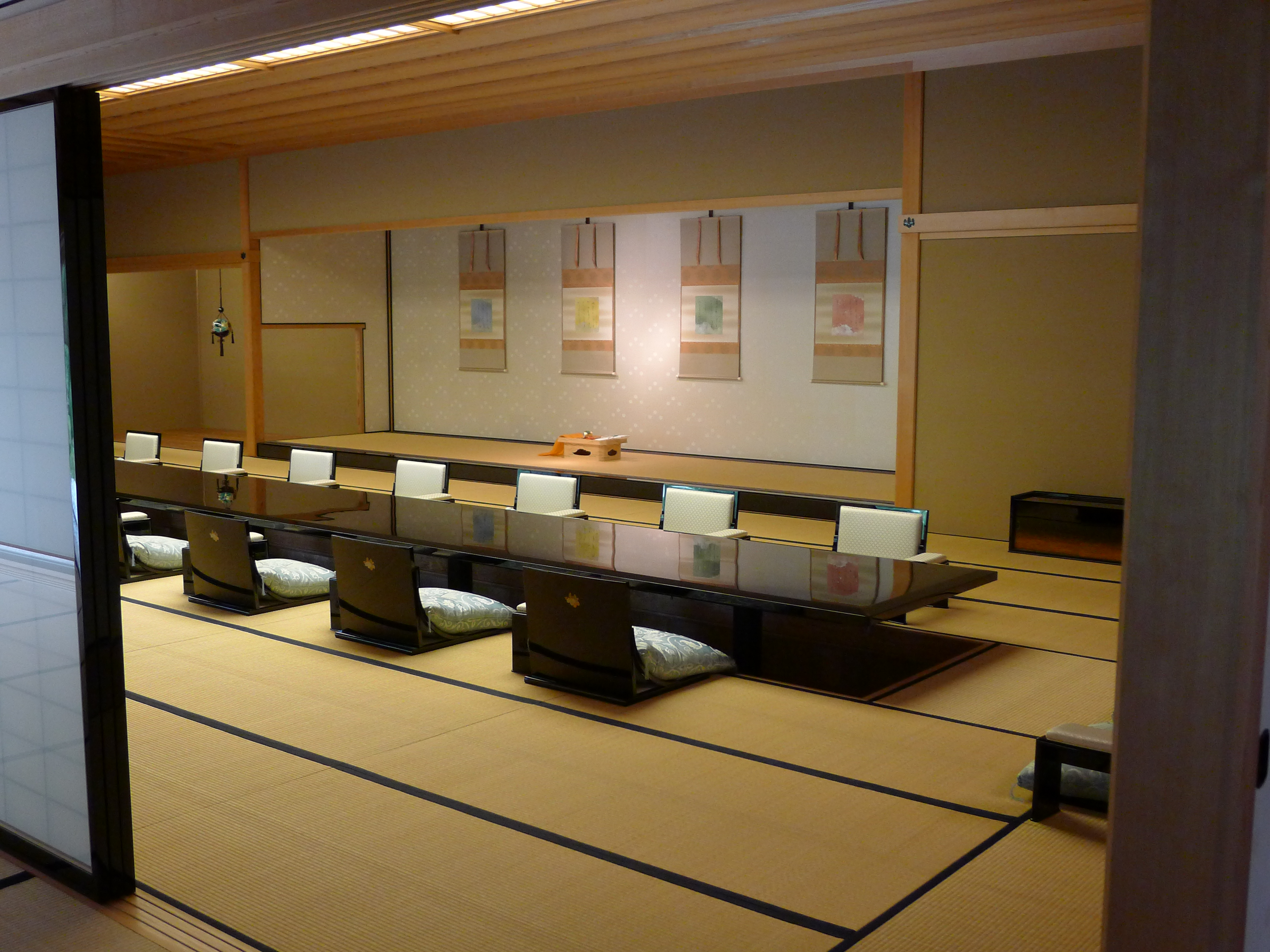 京都迎賓館：和食晩餐会用の座敷部屋「桐の間」